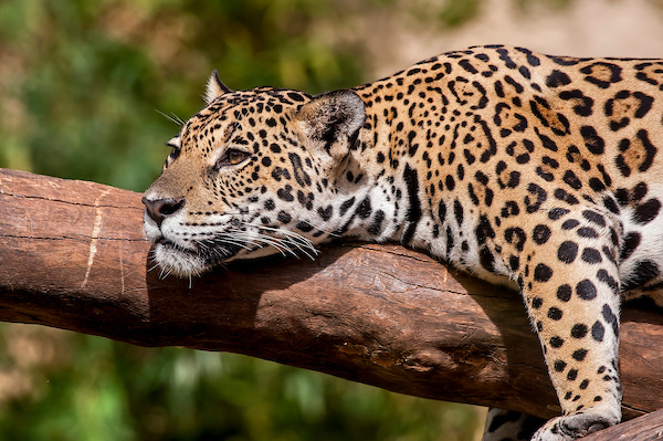 Onça-pintada (Panthera onca) fotografado em cativeiro. Registro feito em 2014 | Jaguar photographed at zoo. Picture made in 2014.